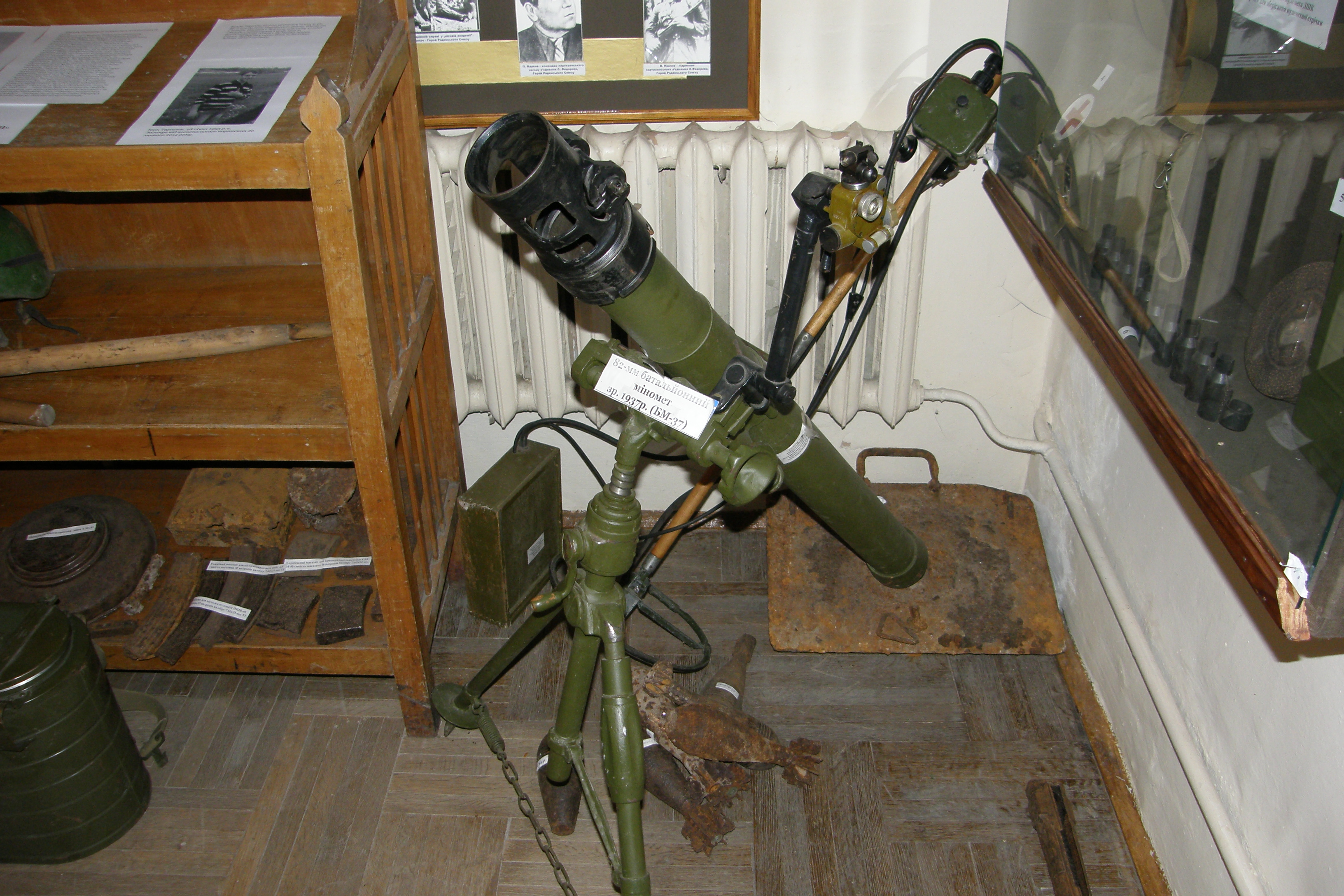 82-mm-Granatwerfer BM-37 in Luzk/Ukraine